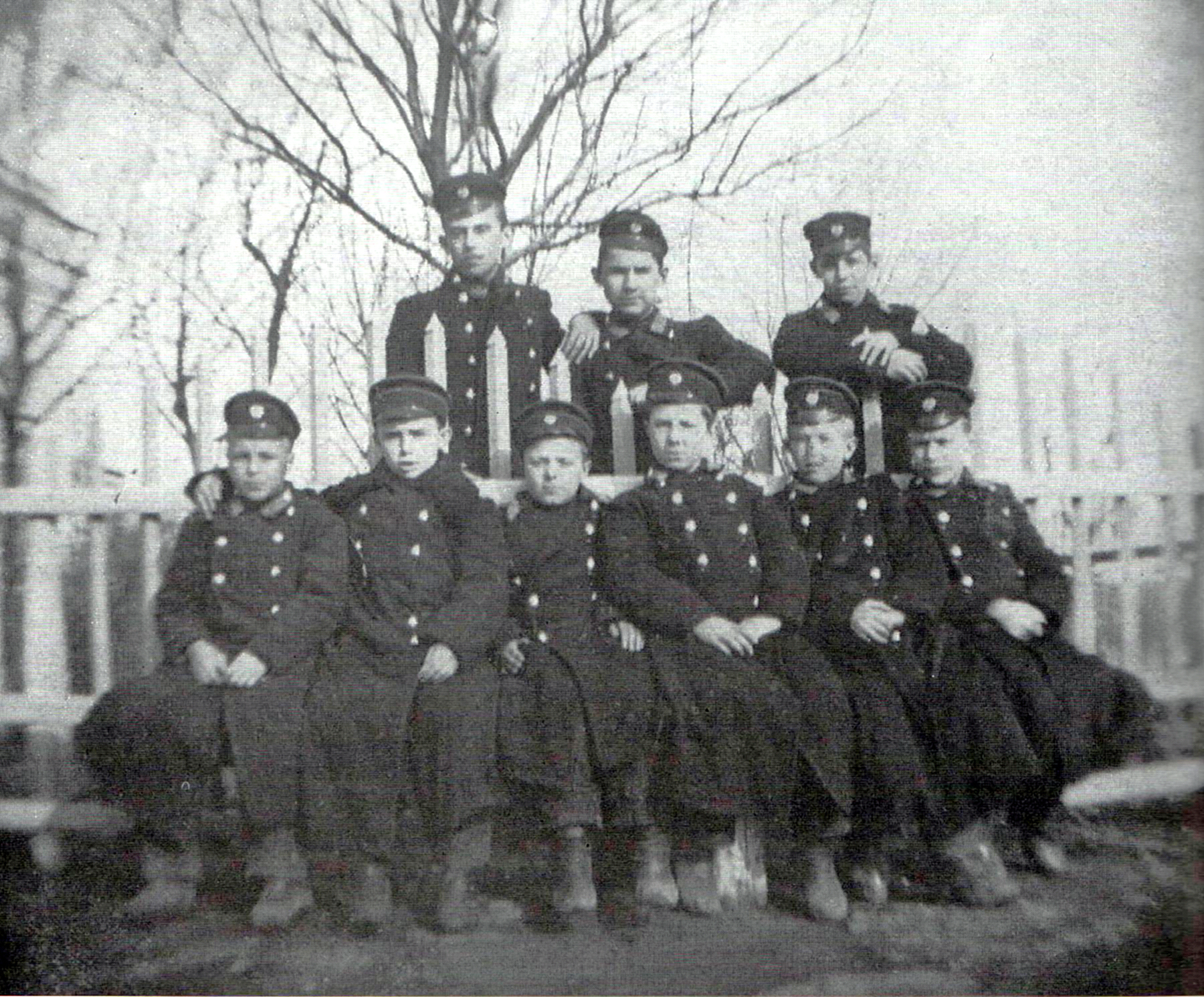 Ученики ливенского духовного училища (Н. Поликарпов — первый ряд, 2-й слева). Март 1903г.